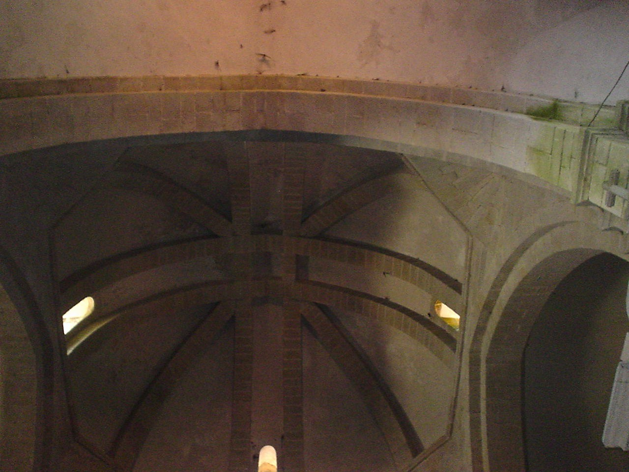 Kloster Armenteira, Galicien, Spanien, Kuppel